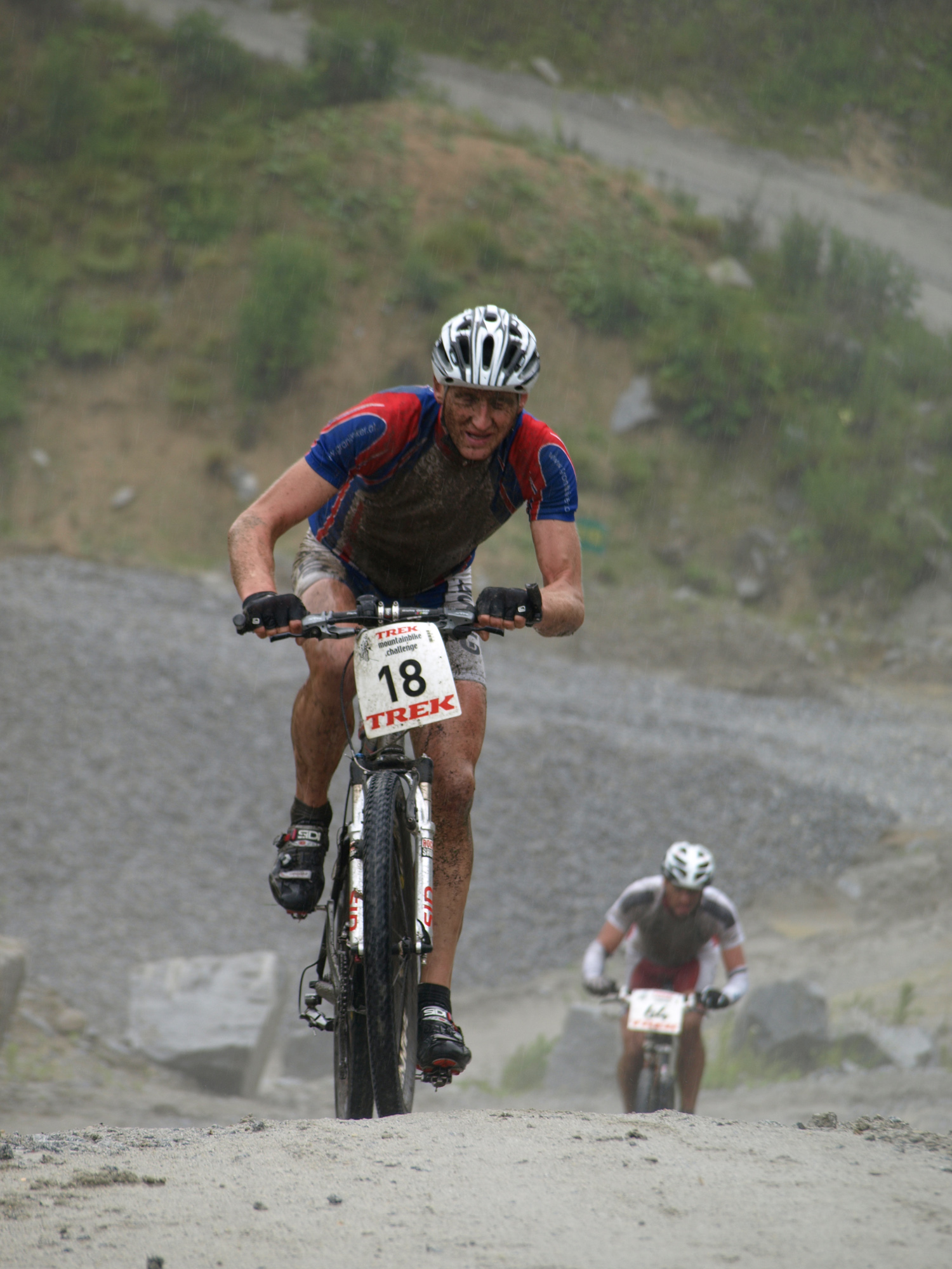 Mountainbiker durchquert den Steinbruch